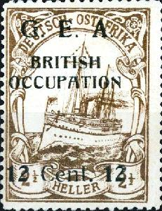 Britische Fälschung einer deutschen "Ostafrika-Marke" mit Propagandaaufdruck.